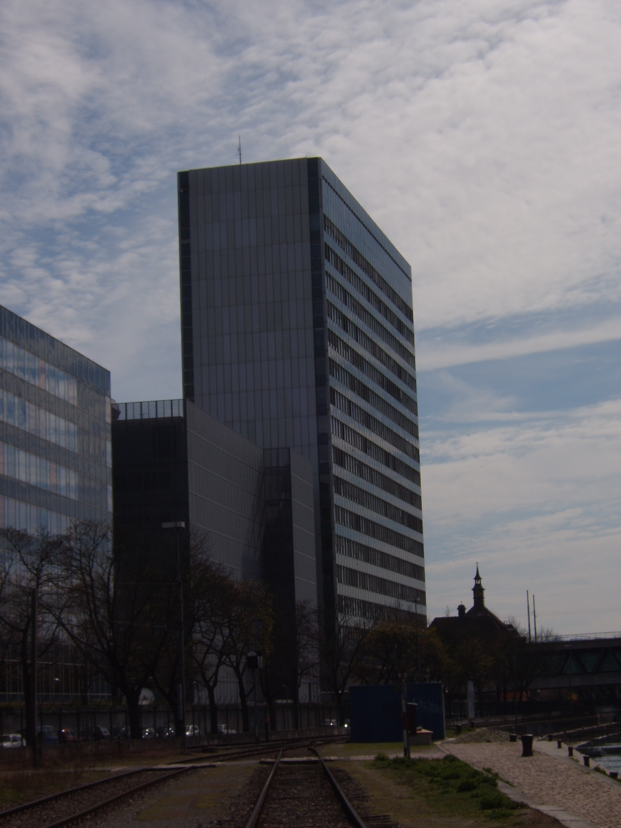 tour novartis à basel depuis Klein Hüningen